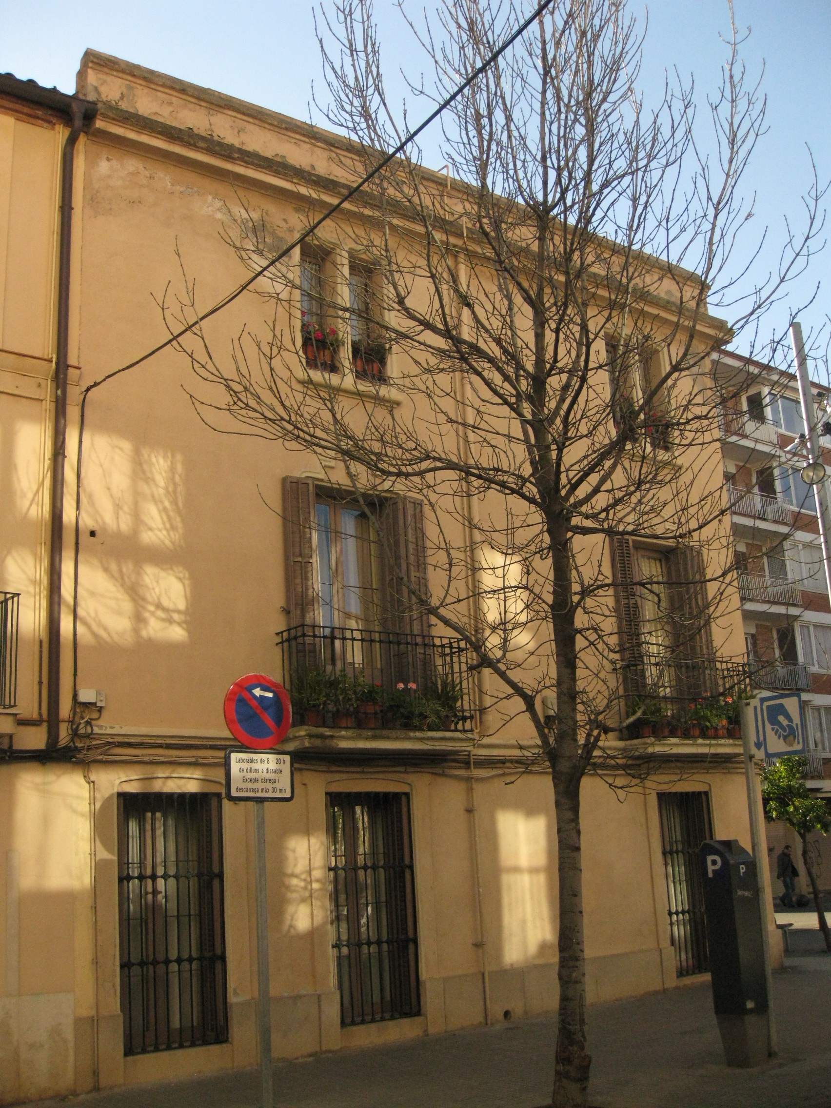 Casa Josep Arias, al carrer de la Creu Gran núm. 26 (Terrassa). Edifici eclèctic de mitjan segle XIX.